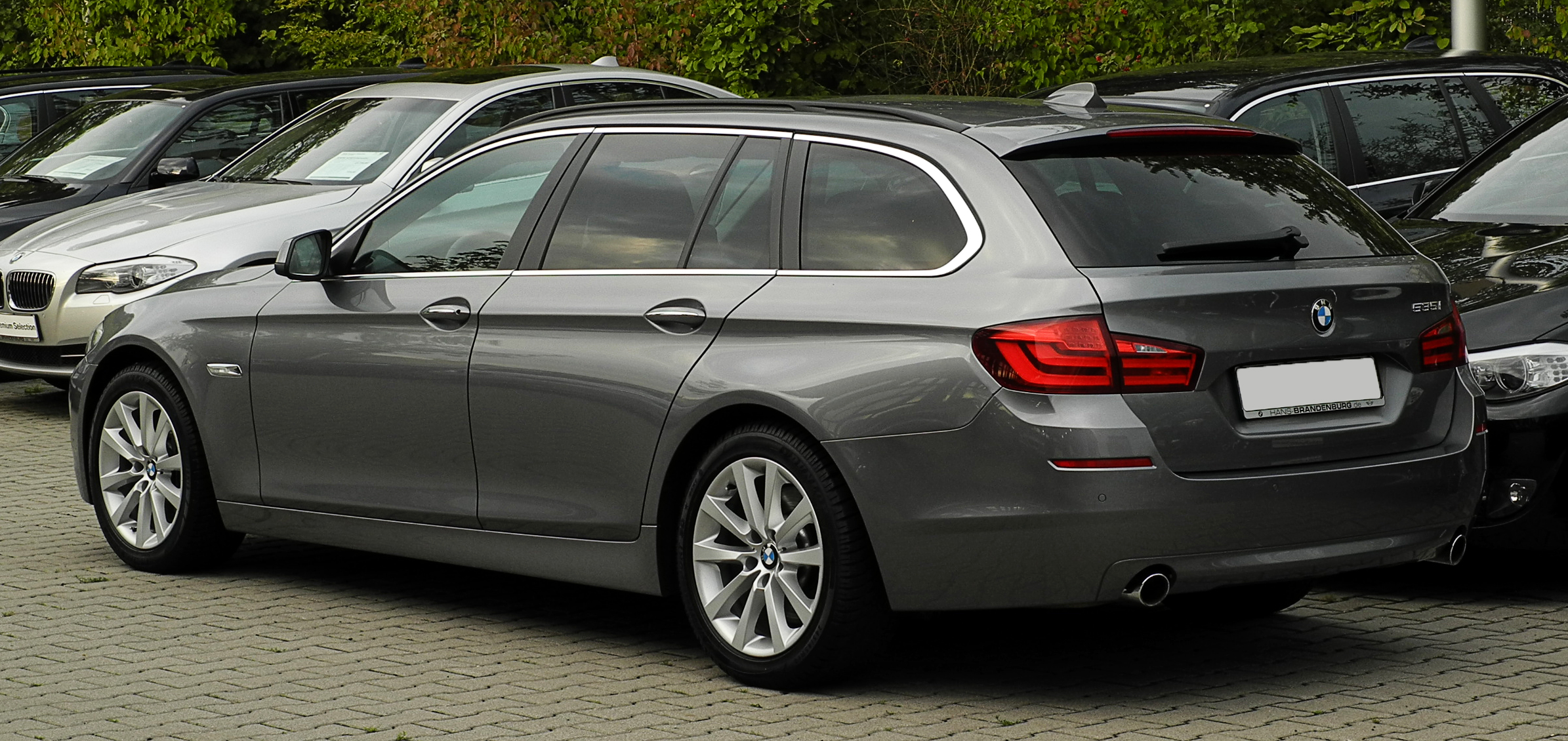 BMW 535i Touring (F11)